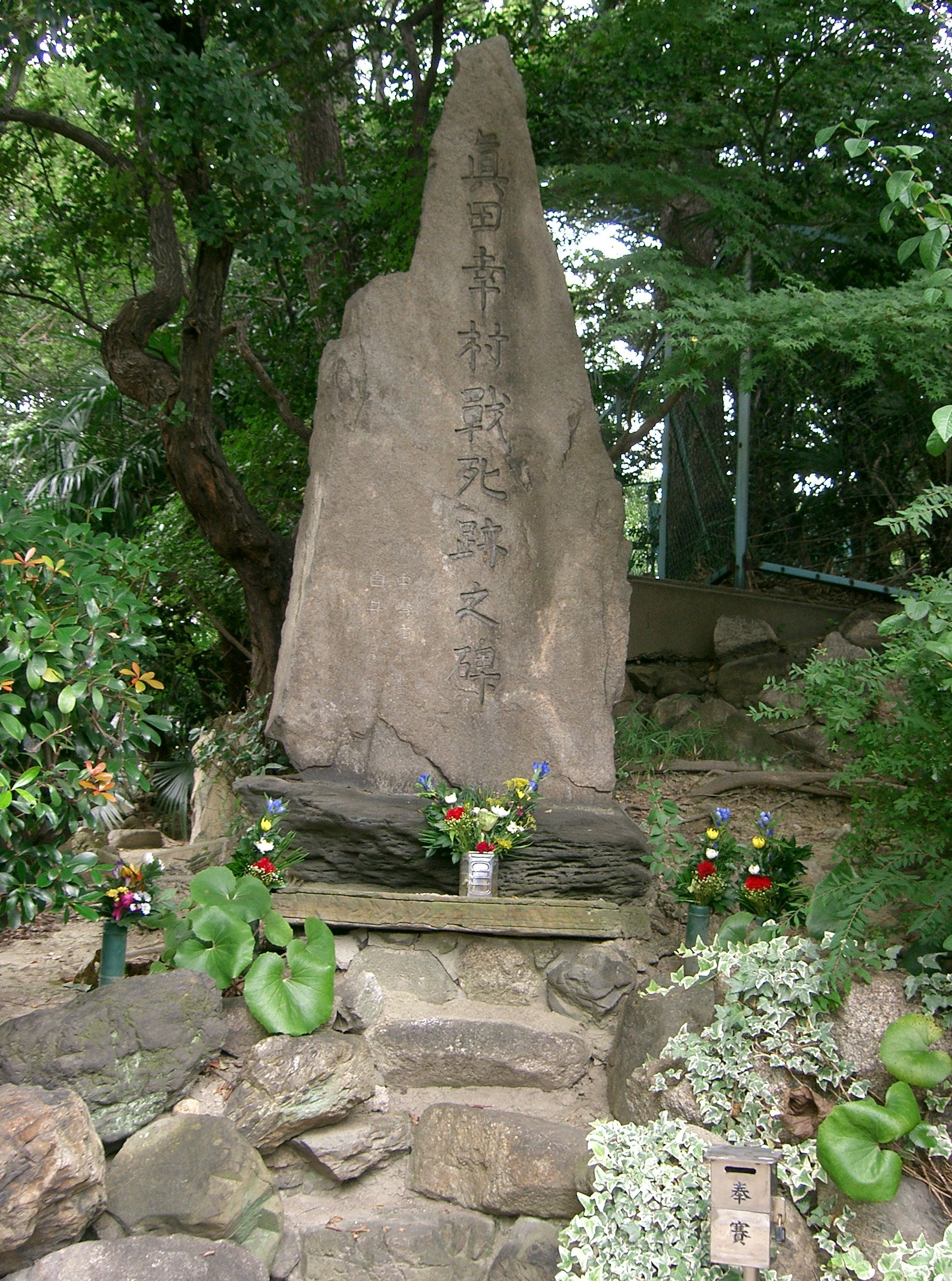 安居神社の真田幸村戦死跡之碑